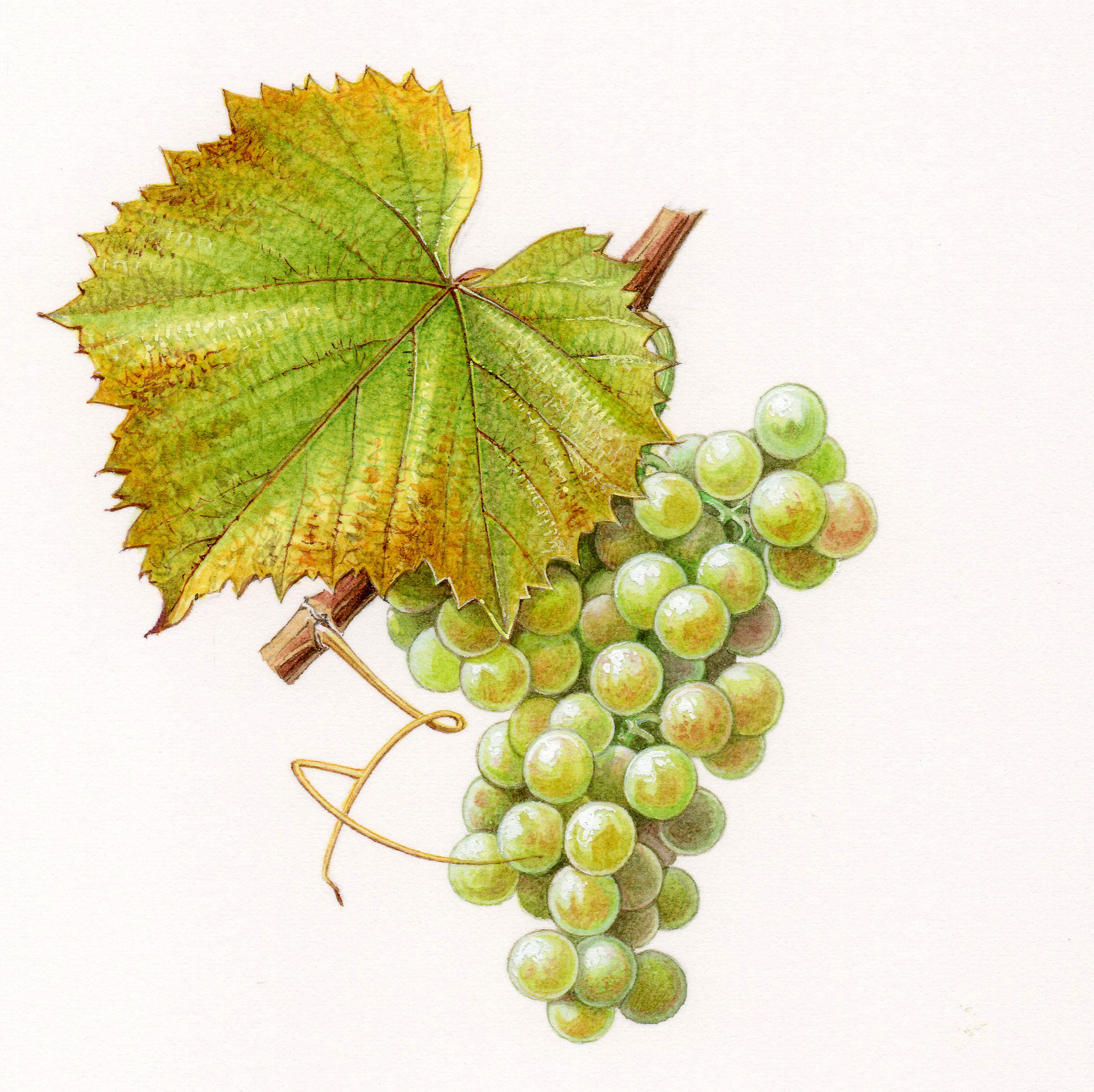 aquarelle originale des cépages de France (2001)